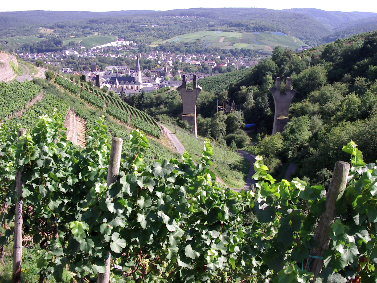 Brückenpfeiler oberhalb von Ahrweiler Markt der "Unvollendeten", Pentax Optio 230 Object location50° 32′ 43.63″ N, 7° 05′ 26.94″ E